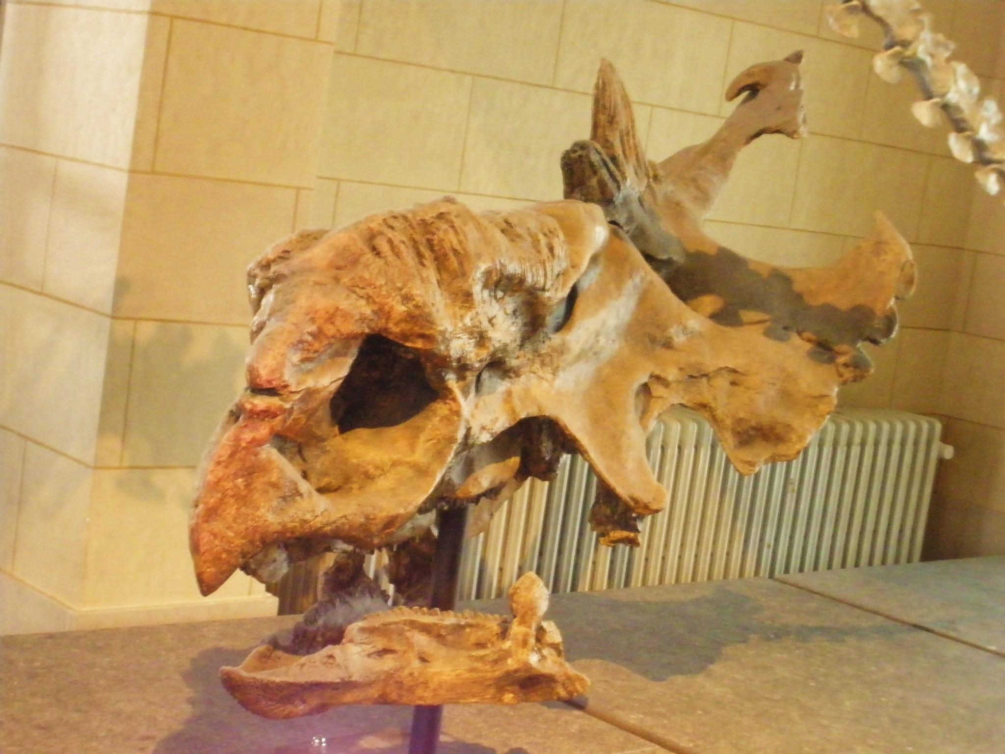 Fossil of Pachyrhinosaurus, a ceratopsian dinosaur Took the photo at Musee d'Histoire Naturelle, Brussels